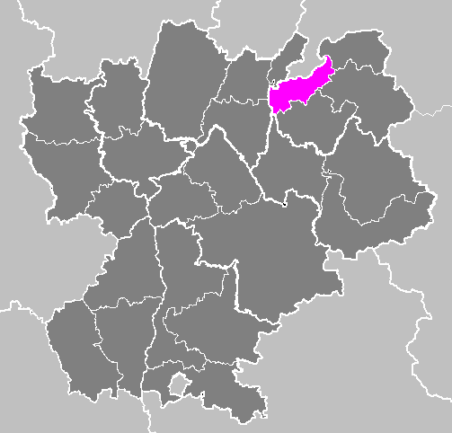 Maps of arrondissements and cantons of France: Arrondissement de Saint-Julien-en-Genevois.PNG (Région Rhône-Alpes)